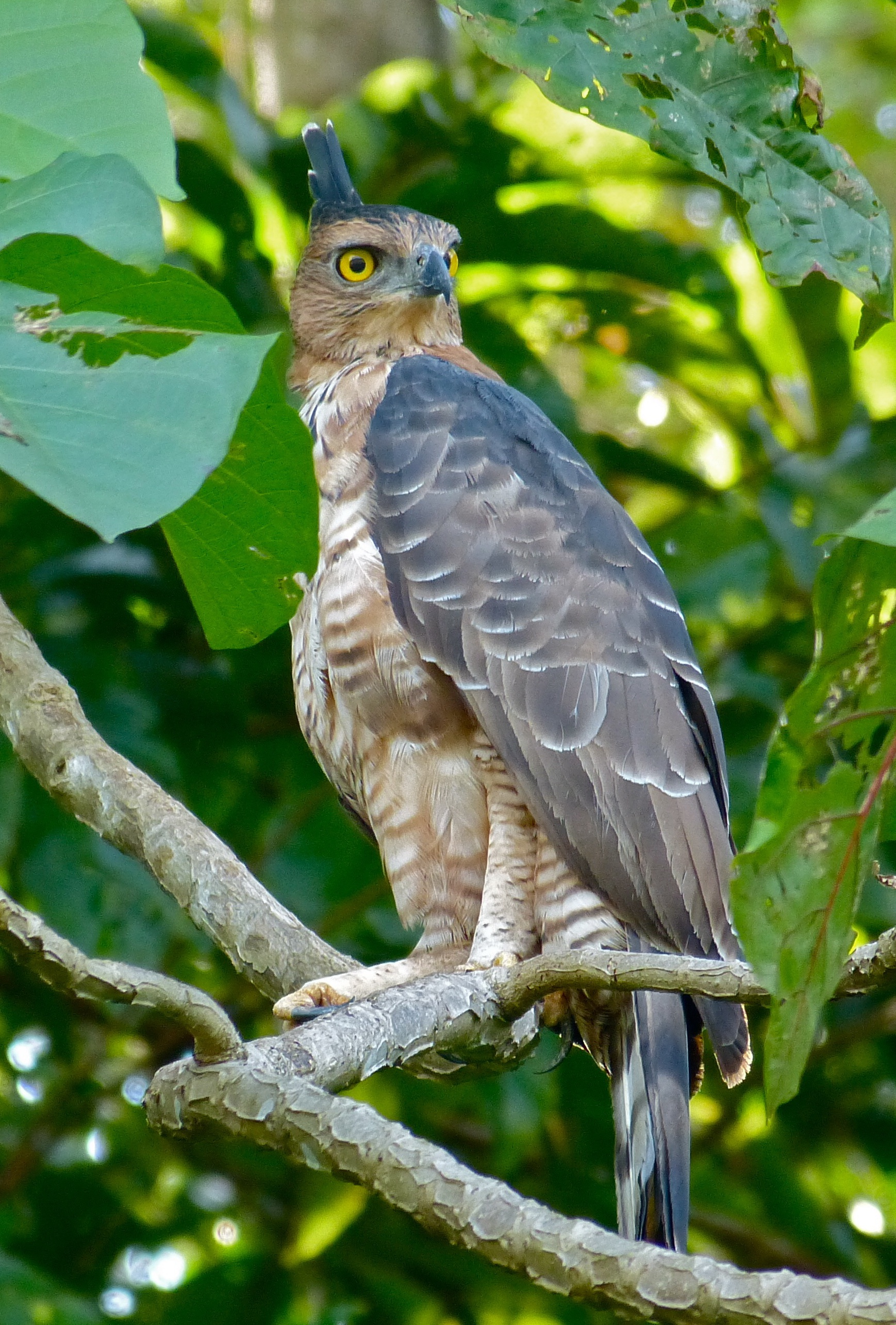 Kinabatangan River, Sukau, Sabah, MALAYSIA